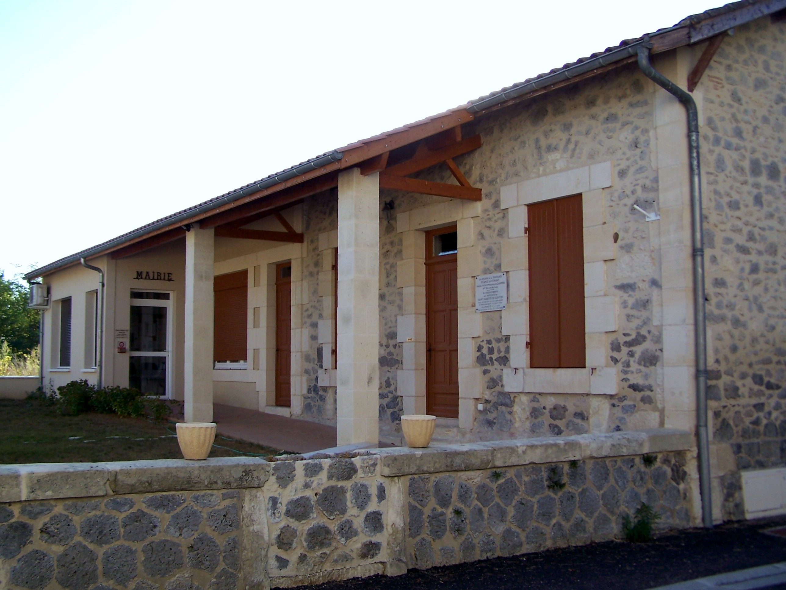 Mairie de Saint-Martin-Curton (Gironde, France)